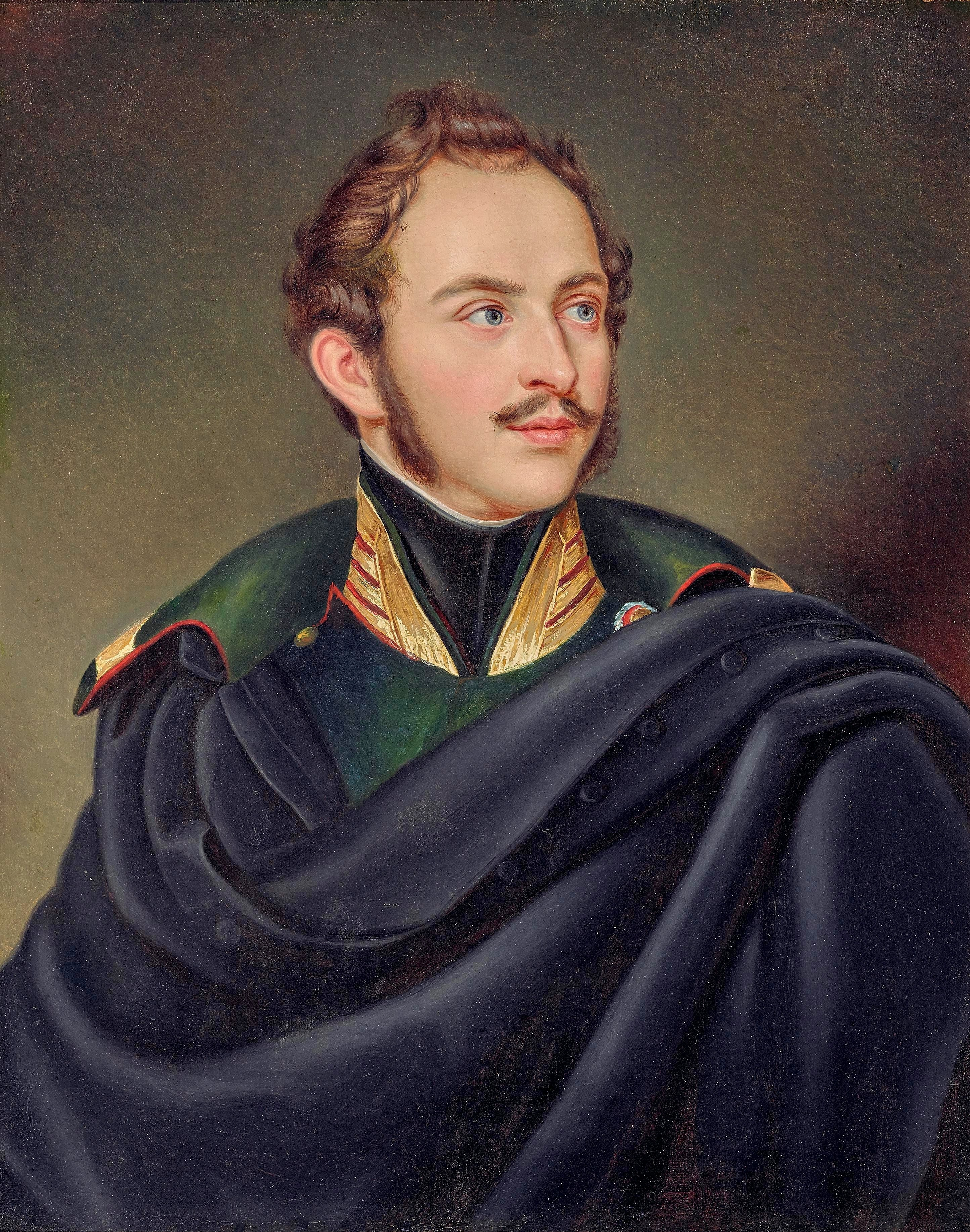 Kronprinz Maximilian von Bayern (1811-1864)